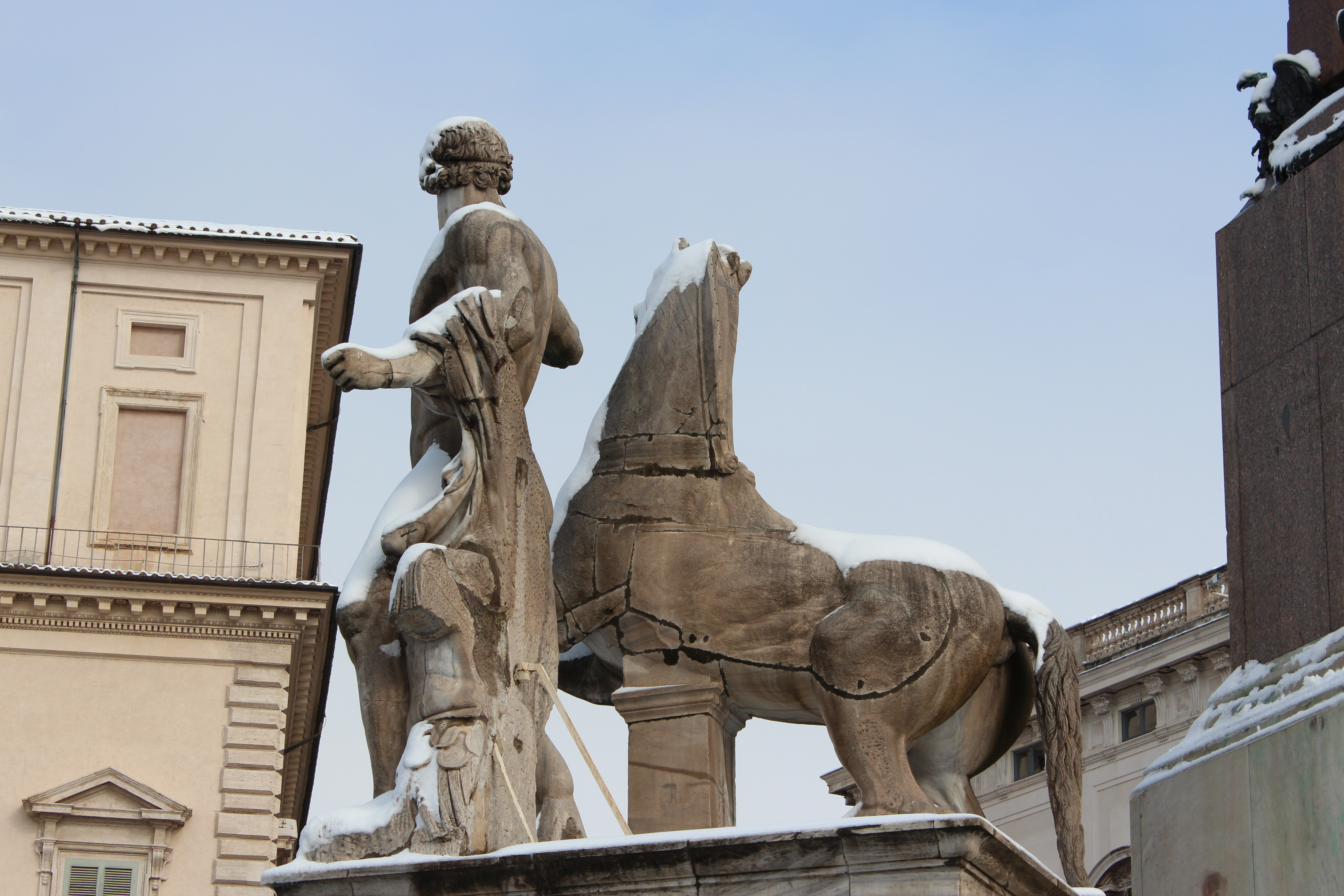 Obelisco del Quirinale, la neve su una delle statue dei Dioscuri